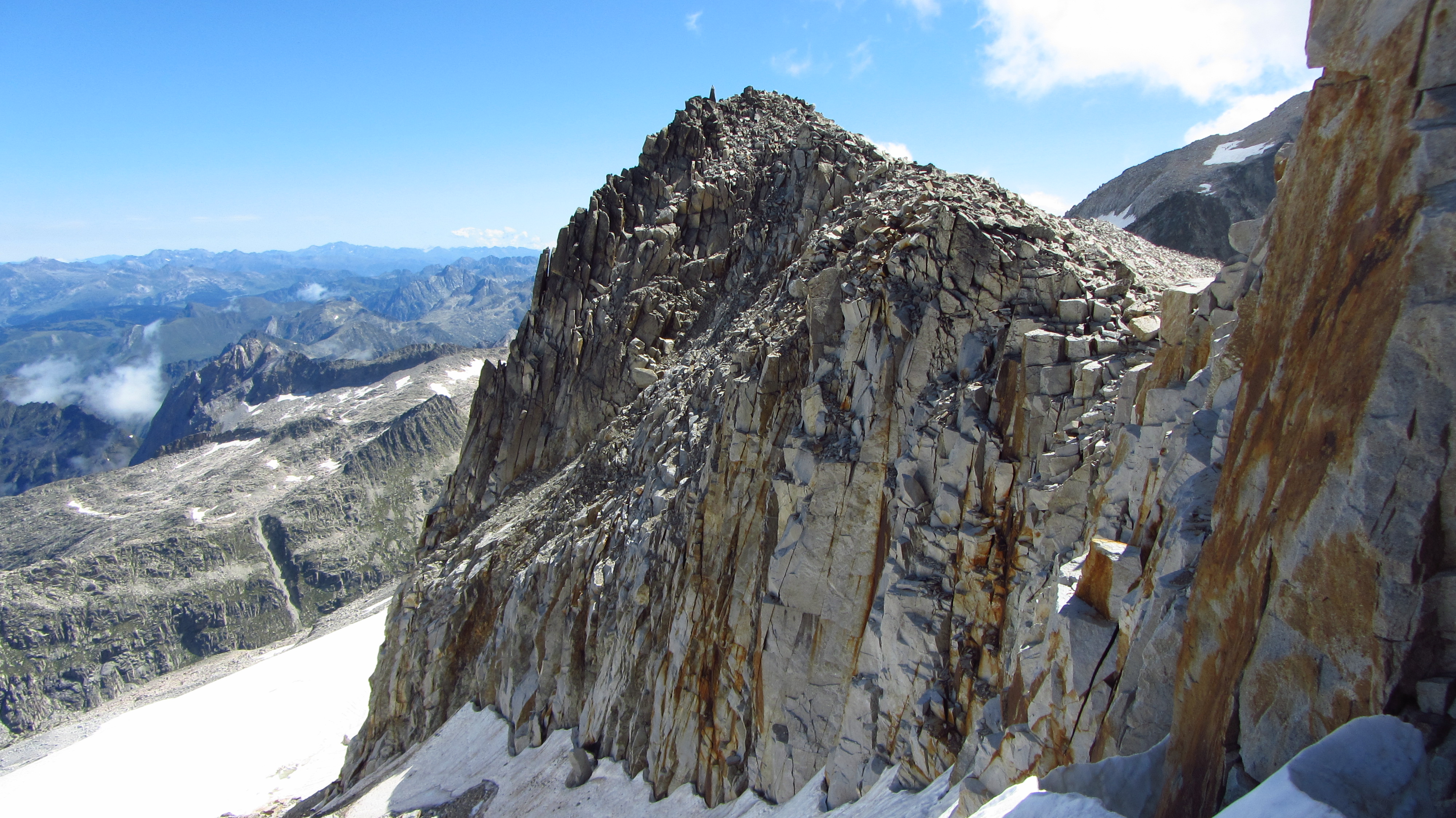 Pic de Corones (3.298 m.) pres des del Coll del Mig. Massís de la Maladeta